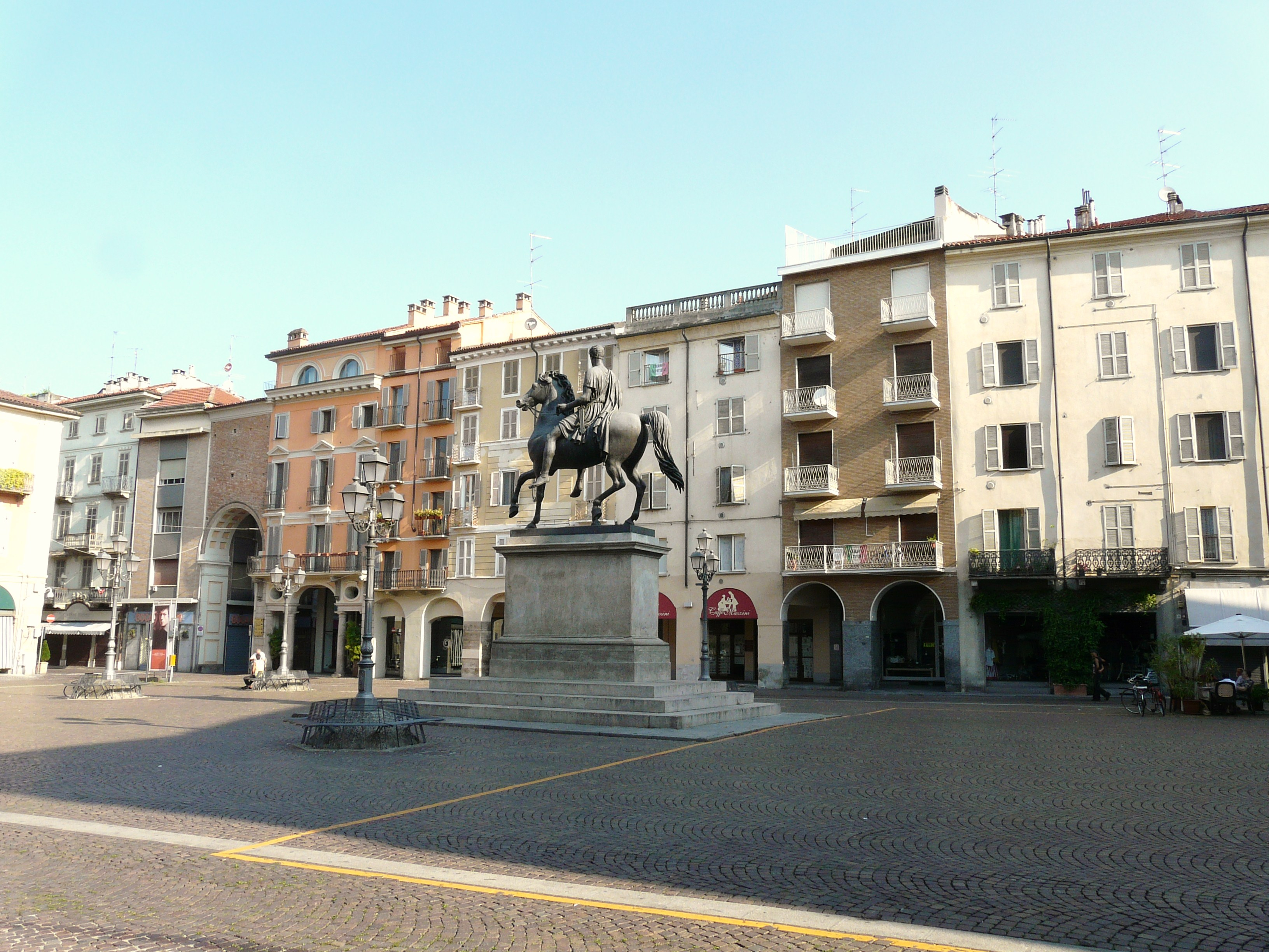 Piazza Giuseppe Mazzini, Casale Monferrato, Piemonte, Italia